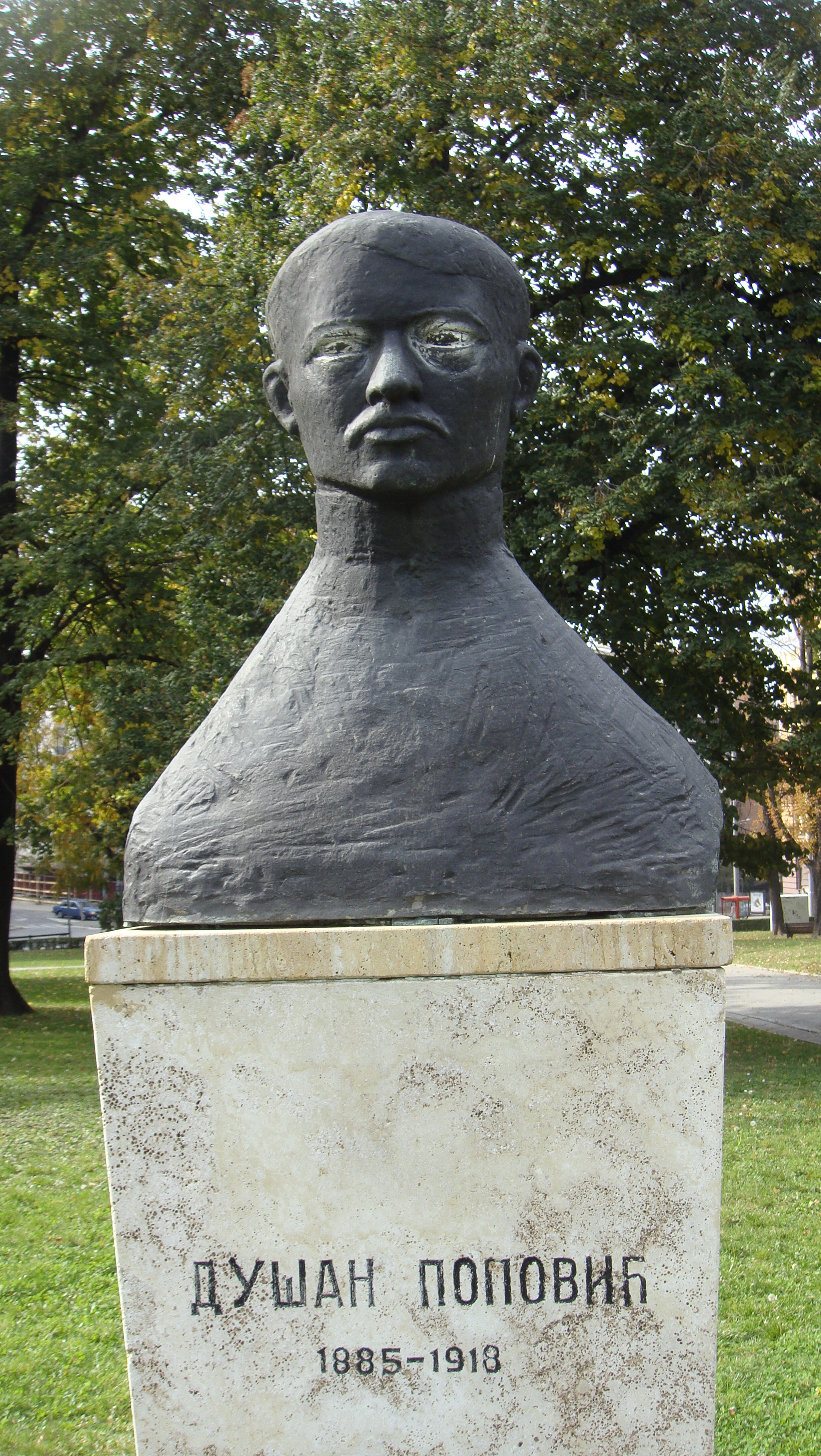 Srpski (latinica): Bista Dušana Popovića u parku Manjež, Beograd.